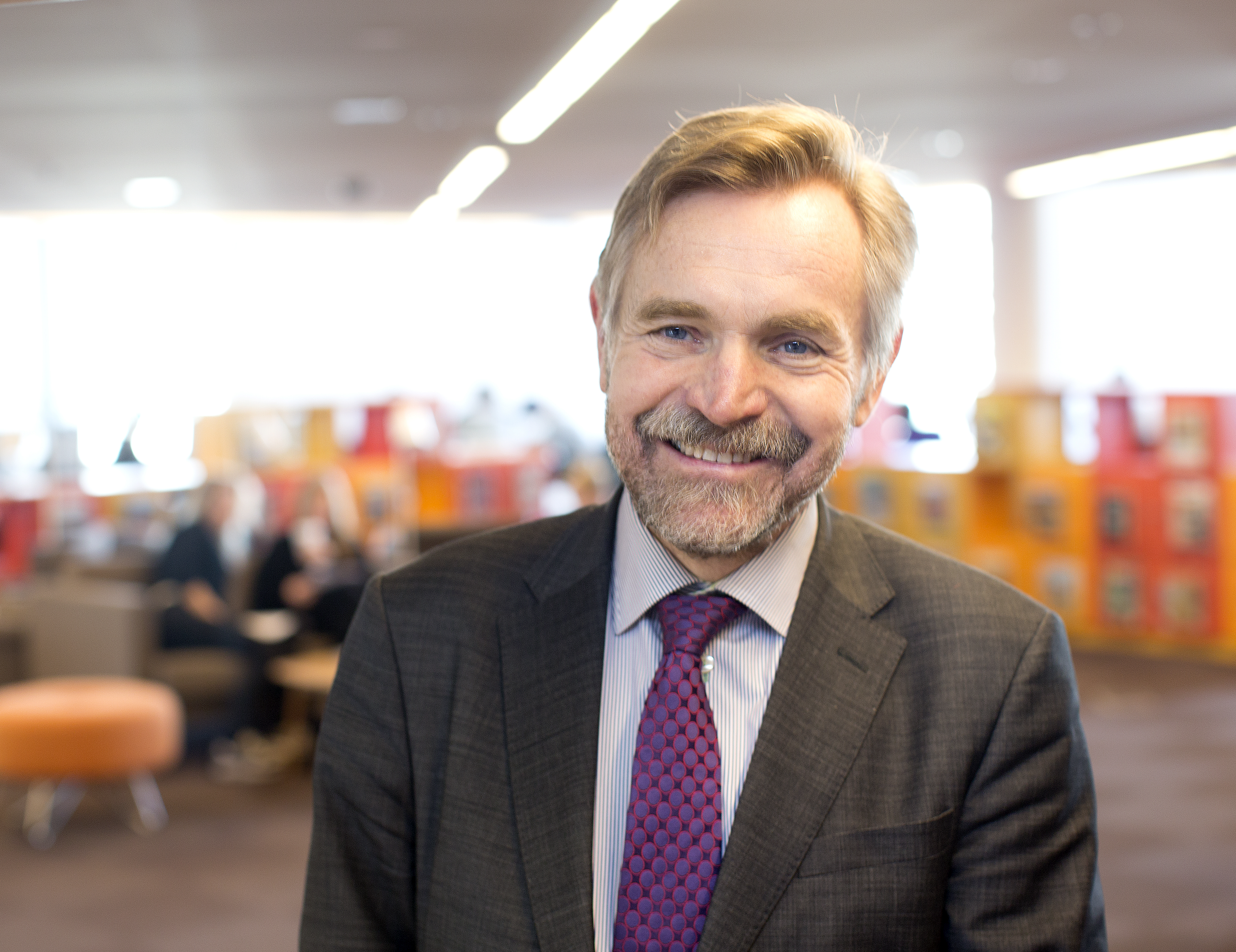 Björn Brorström, rekor för Högskolan i Borås.